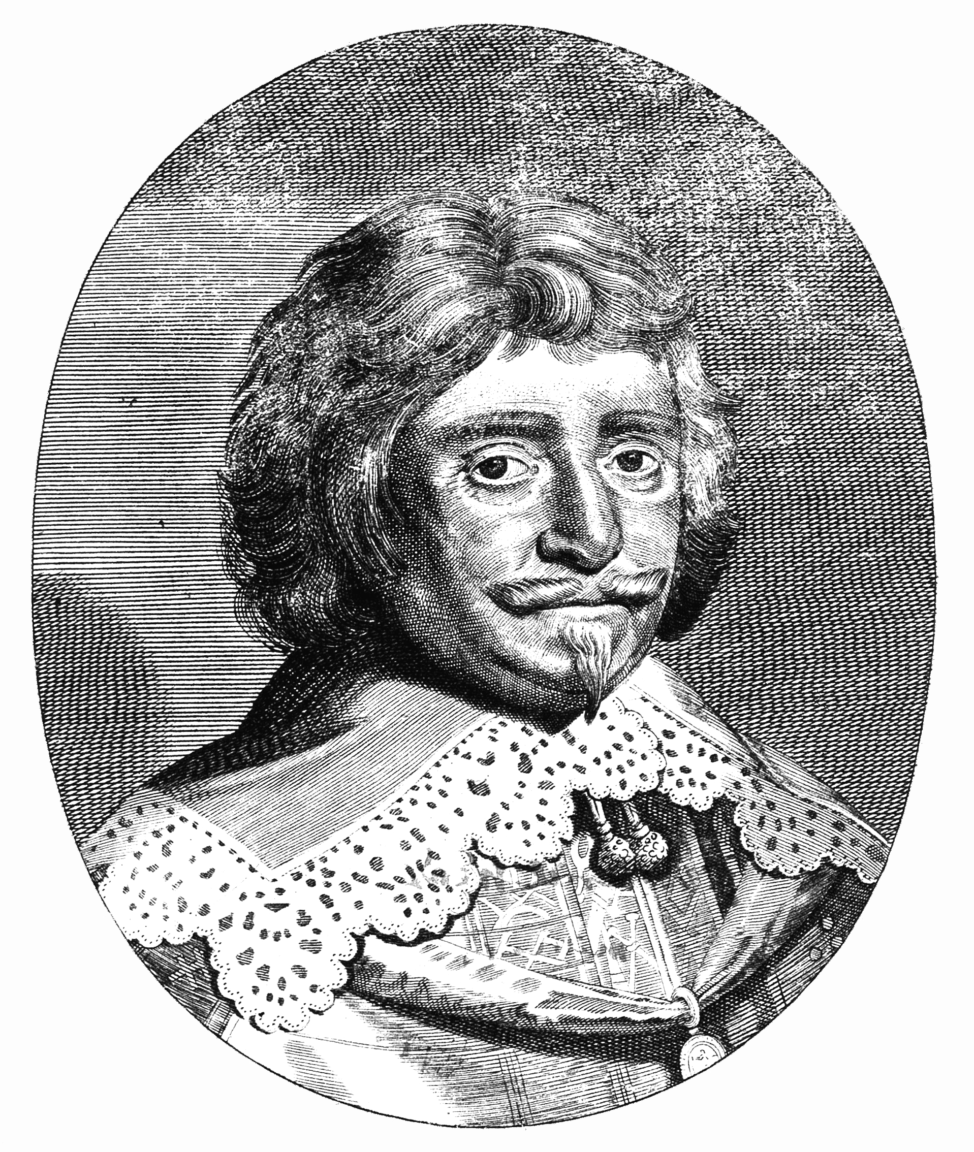 Portrait Angelo Sala